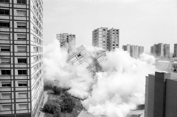 Le 9 juin 1983, vingt kilos d'explosif ont eu raison de quatre mille tonnes de béton. La démolition de la première tour des Minguettes n'est pourtant qu'un symbole.